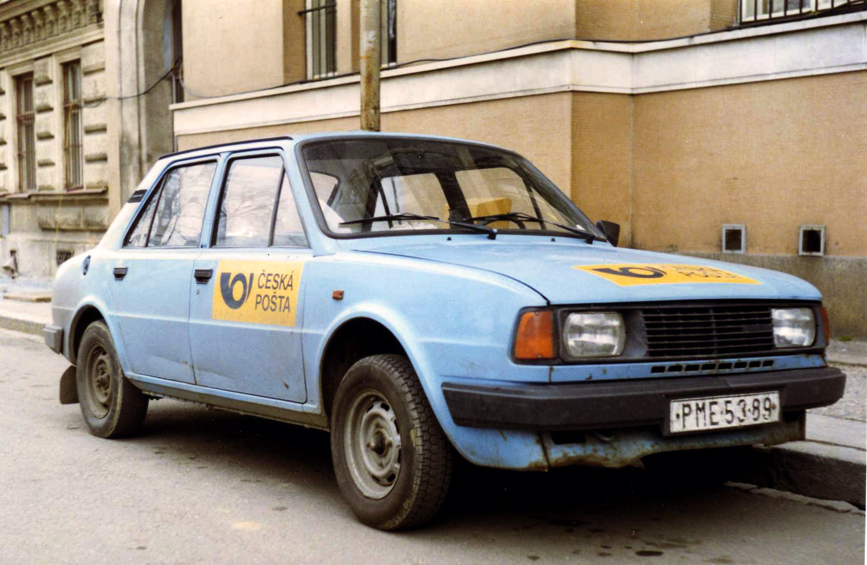 Česká pošta, automobil Škoda 105, Žatec